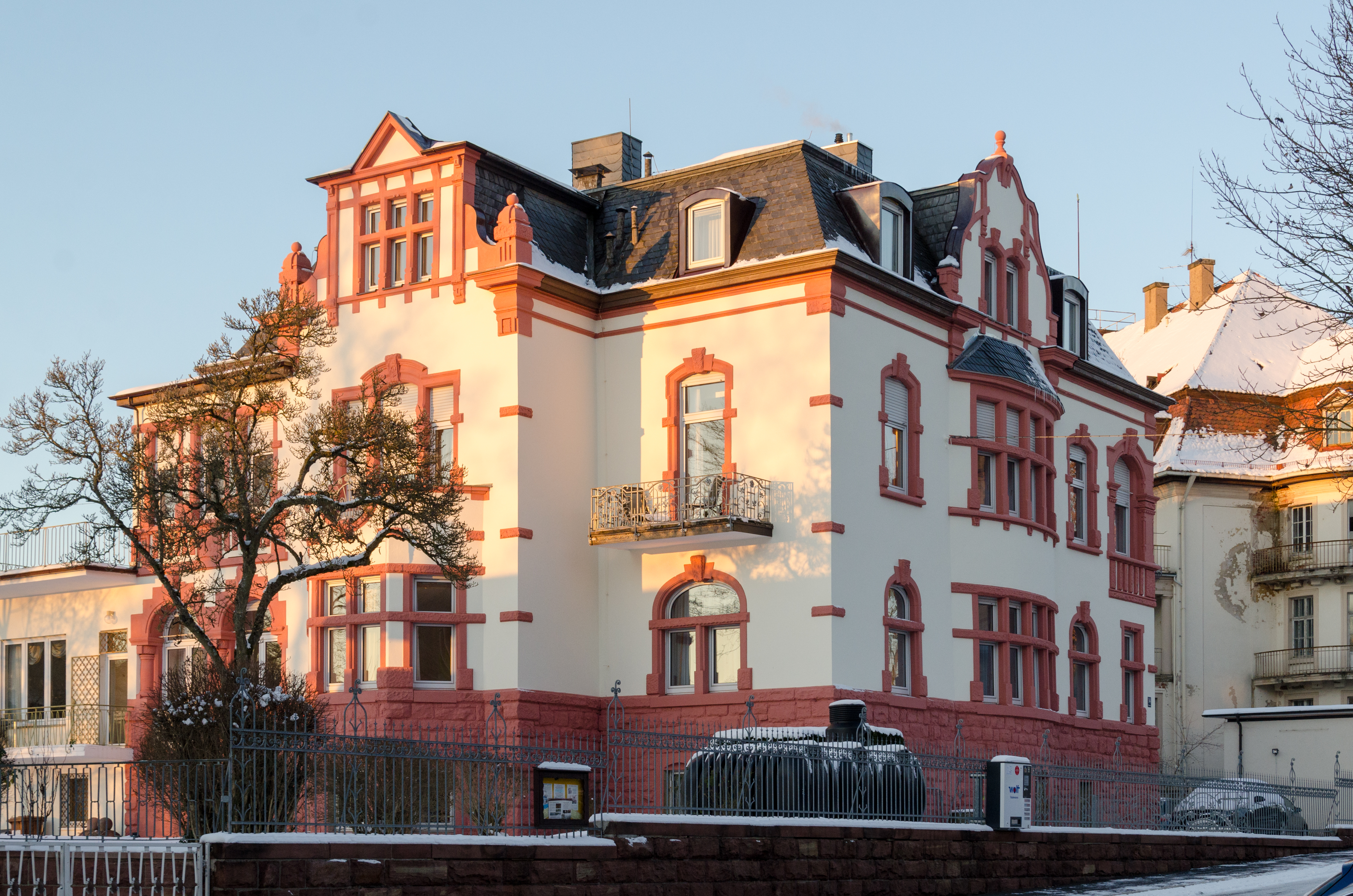 Bad Kissingen, Menzelstraße 14